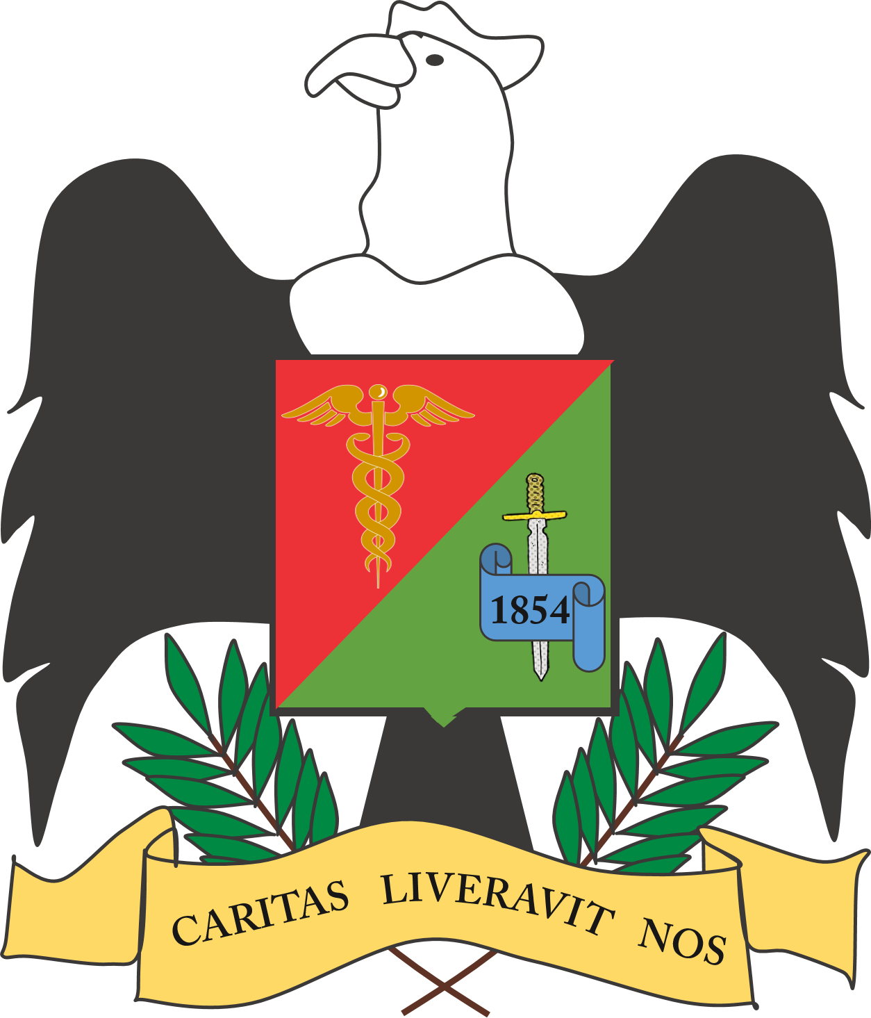 Junín, Huancayo, Perú